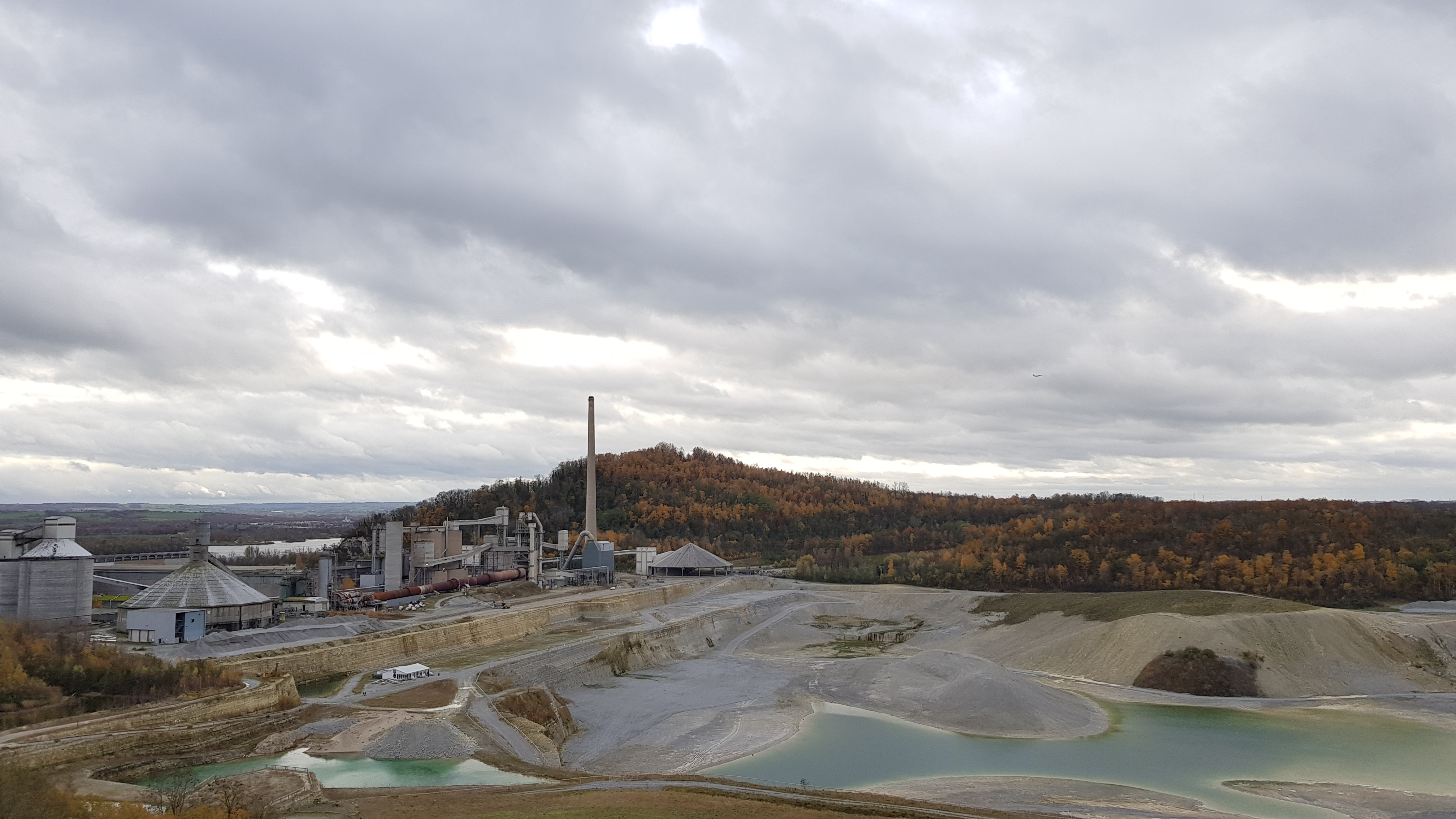 D'n Observant en de ENCI-groeve, Maastricht, Nederland